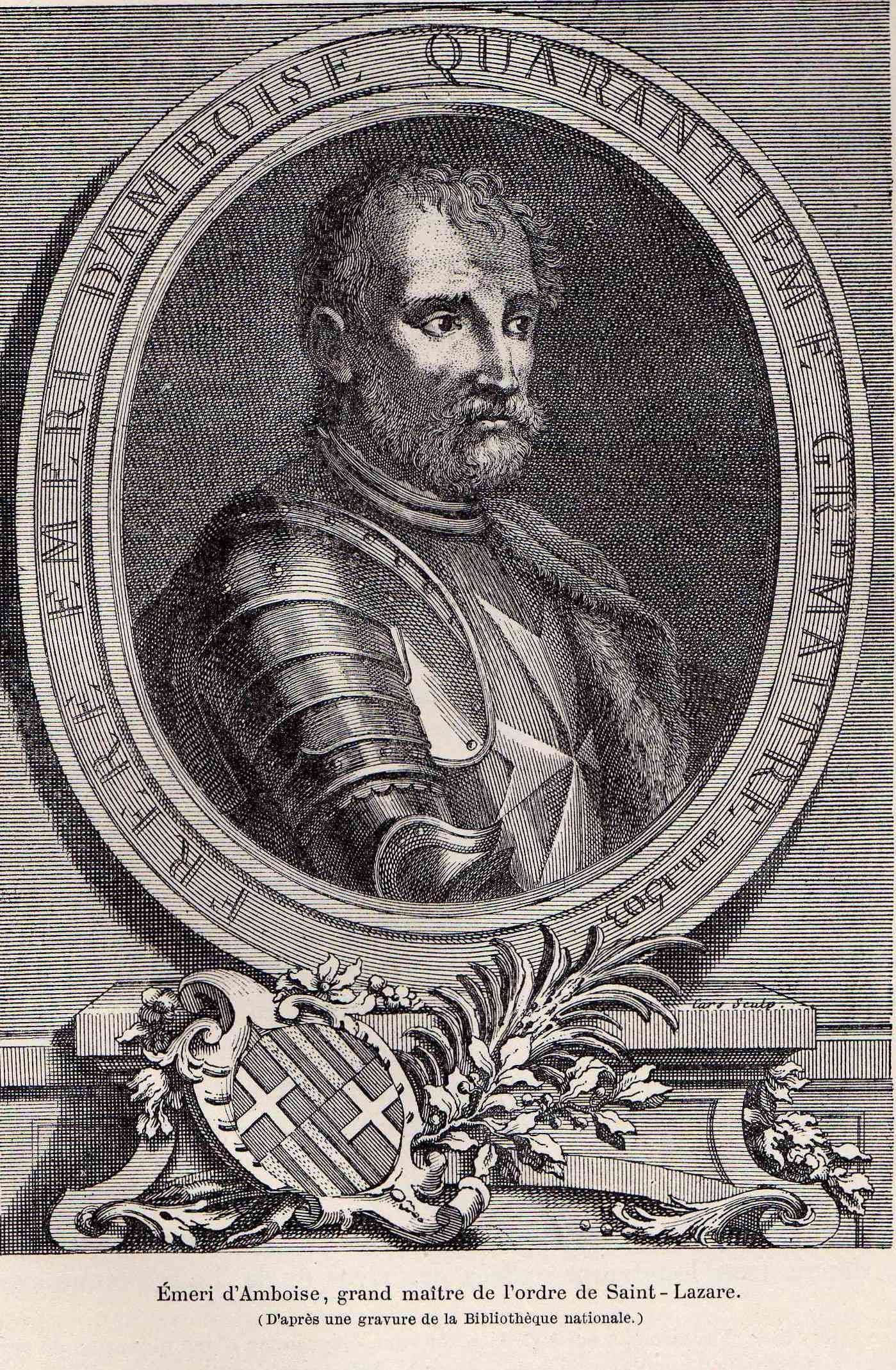 Portrait d'Emery d'AMBOISE - Grand-Maître de l'ordre de Saint-Lazare et de l'ordre de Malte de 1503 à 1512.